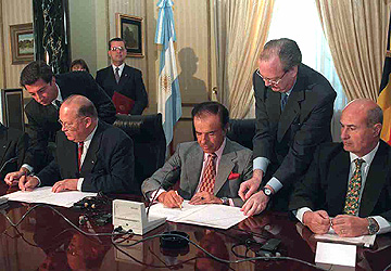 El presidente Carlos Menem y el primer ministro de Bélgica, Sr. Jean-Luc Dehaene, encabezaron el acto de firma de una declaración relativa a la cooperación espacial entre Argentina y Bélgica.